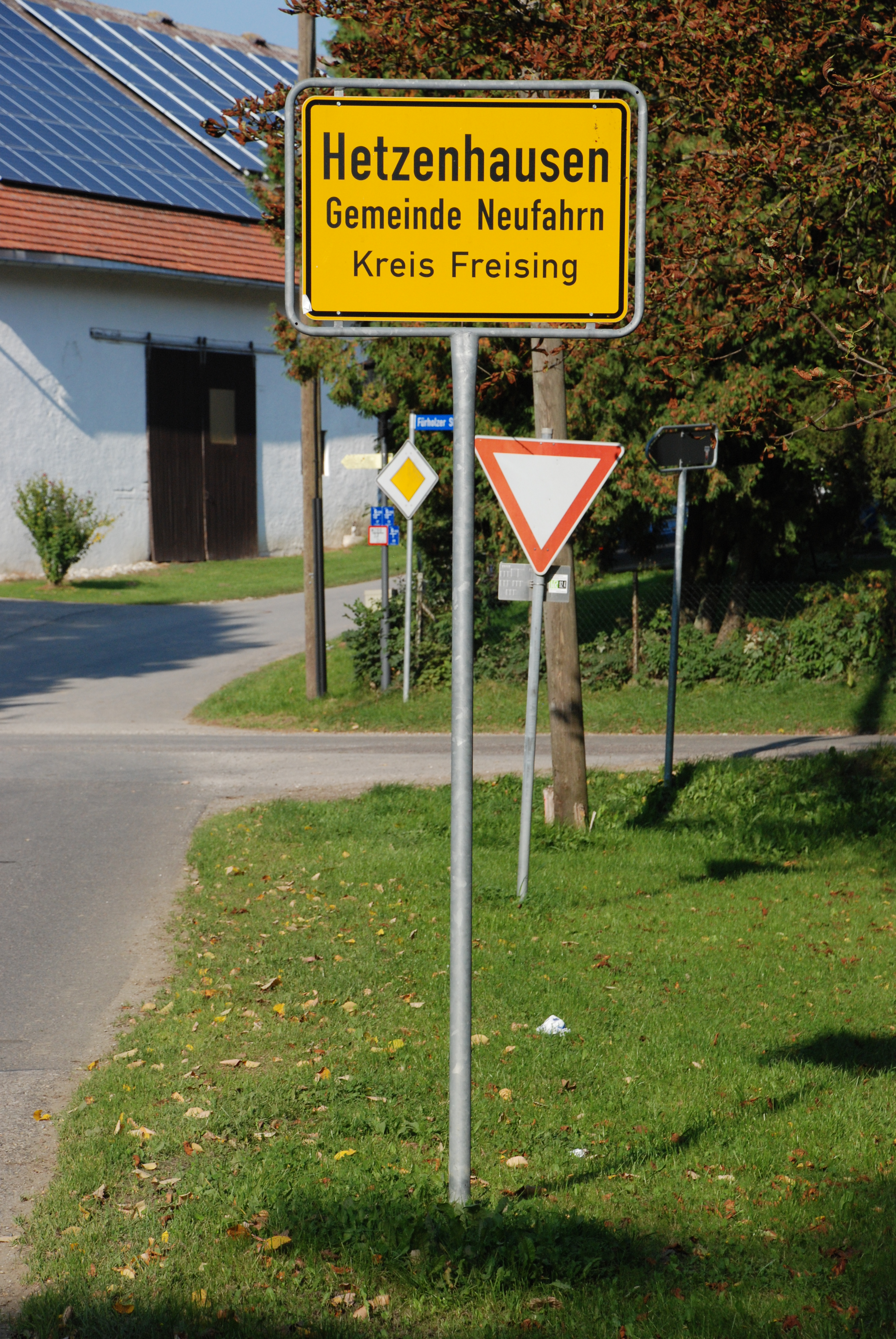 Ortsschild von Hetzenhausen, Ortsteil von Neufahrn, Landkreis Freising, Regierungsbezirk Oberbayern, Bayern.